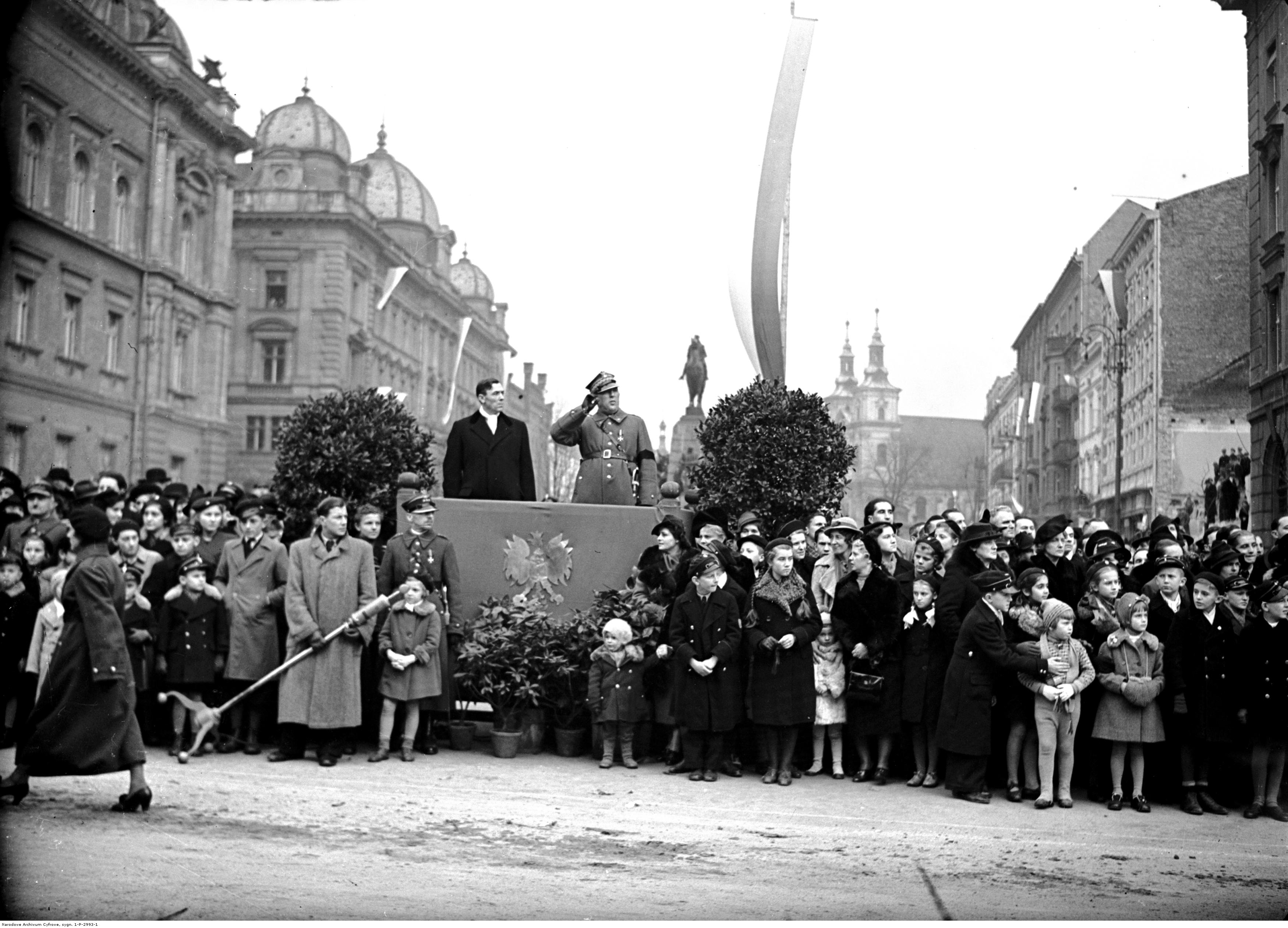 Obchody Święta Niepodległości w Krakowie 11 listopada 1938. Trybuna honorowa podczas defilady. Na trybunie stoją dowódca 6 DP generał Bernard Mond i wojewoda krakowski Józef Tymiński. Koncern Ilustrowany Kurier Codzienny - Archiwum Ilustracji. Sygnatura: 1-P-2993-1